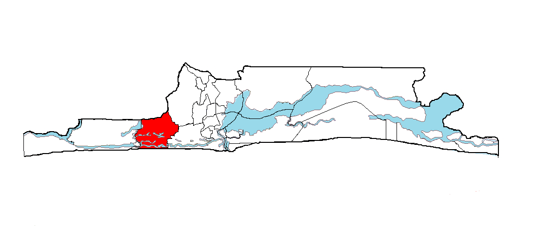 Ubicación de Ojo en el Estado de Lagos